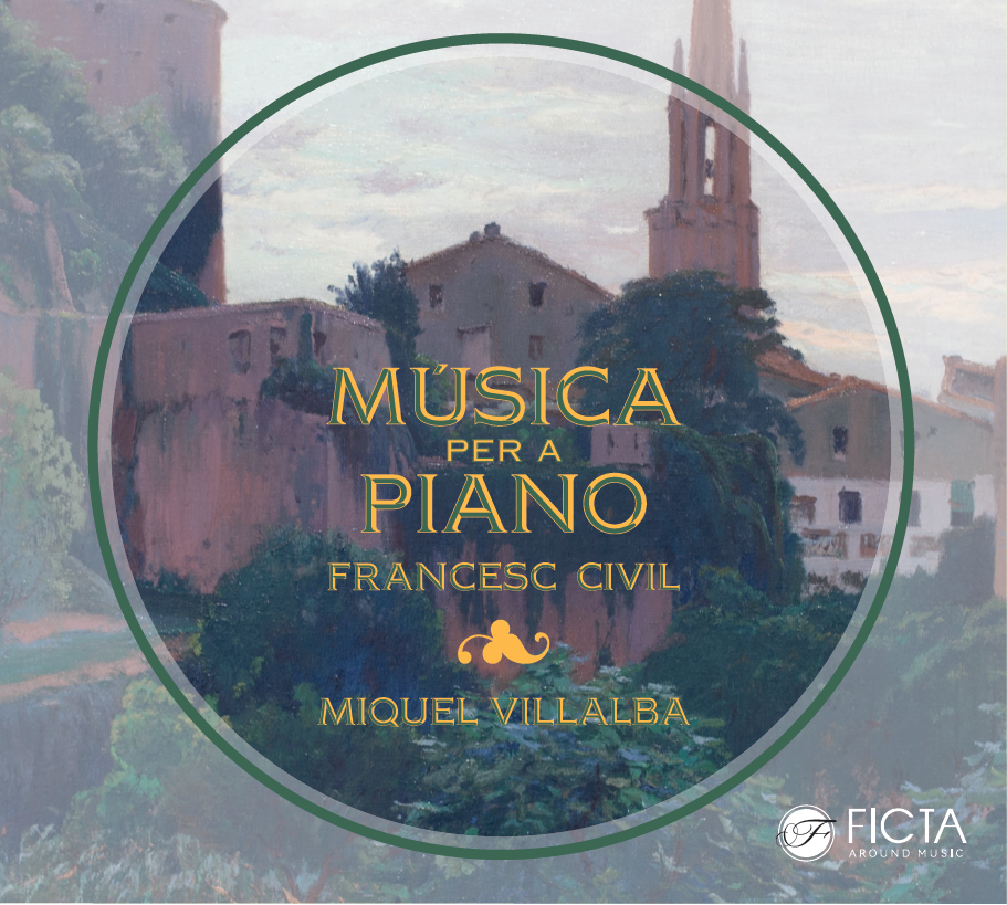 Doble CD amb la integral per a piano sol de Francesc Civil i Castellví interpretada per Miquel Villalba i publicada per FICTA edicions i produccions sl.